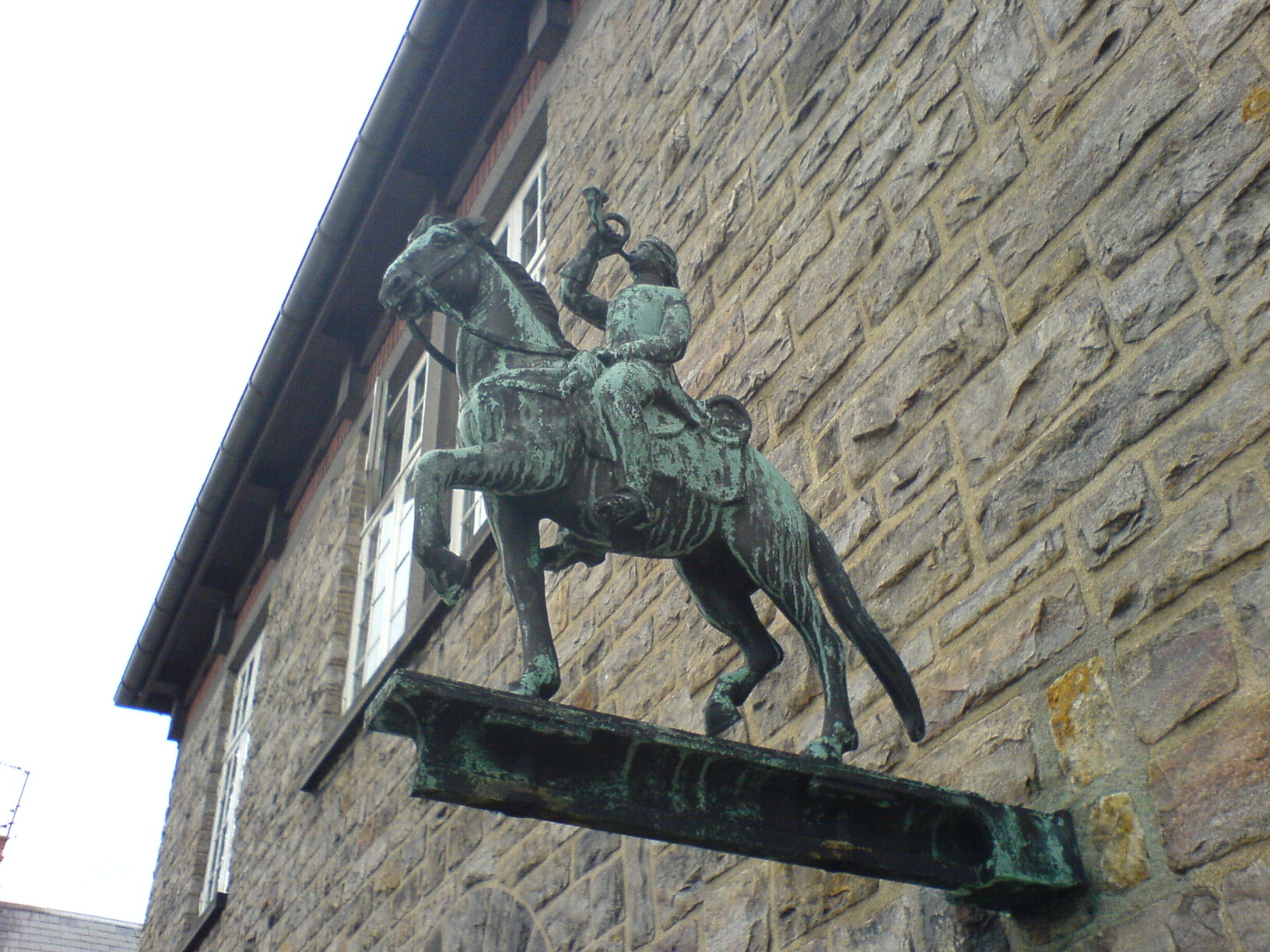 Old Post Danmark logo